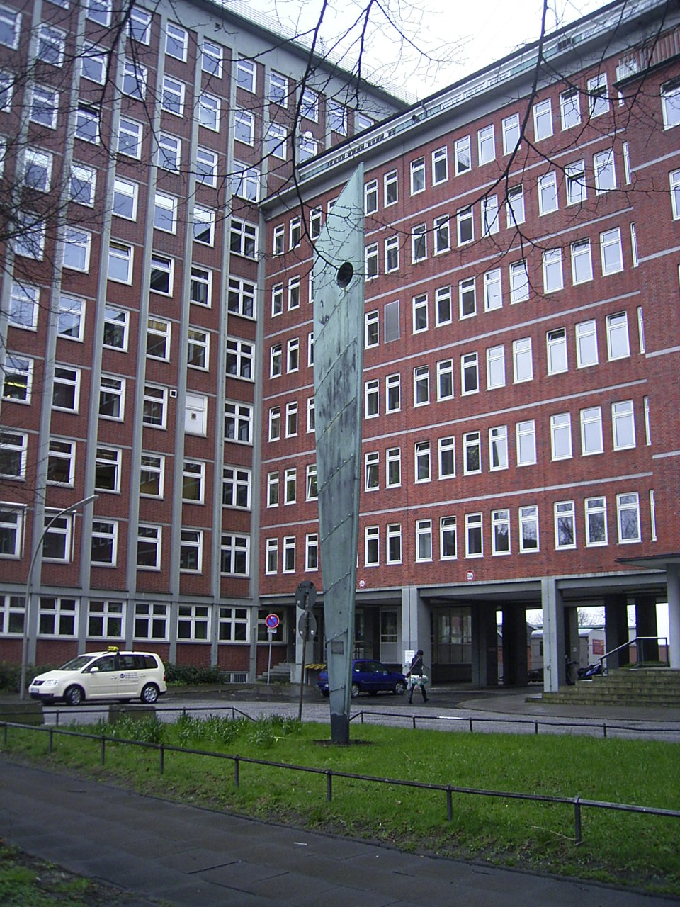 Die Plastik Stilisierter Schiffsbug wurde von dem Kölner Metallbildhauer Josef Jaekel geschaffen. Sie steht seit 1957 vor dem Bundesamt für Seeschiffahrt und Hydrographie in der Bernhard-Nocht-Straße in St. Pauli.